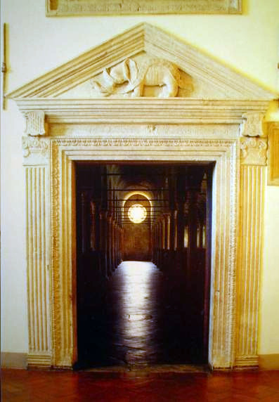 Ingresso della Malatestiana